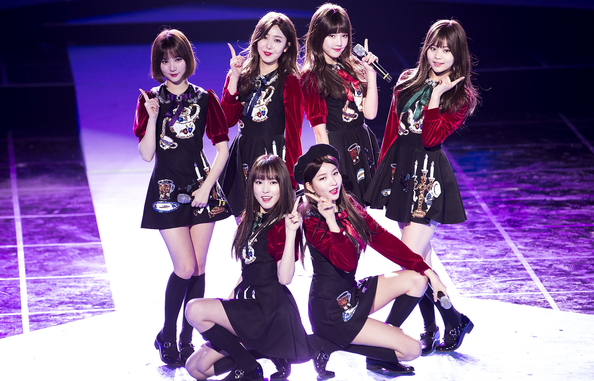 0209 평창올림픽 G-1 축하공연